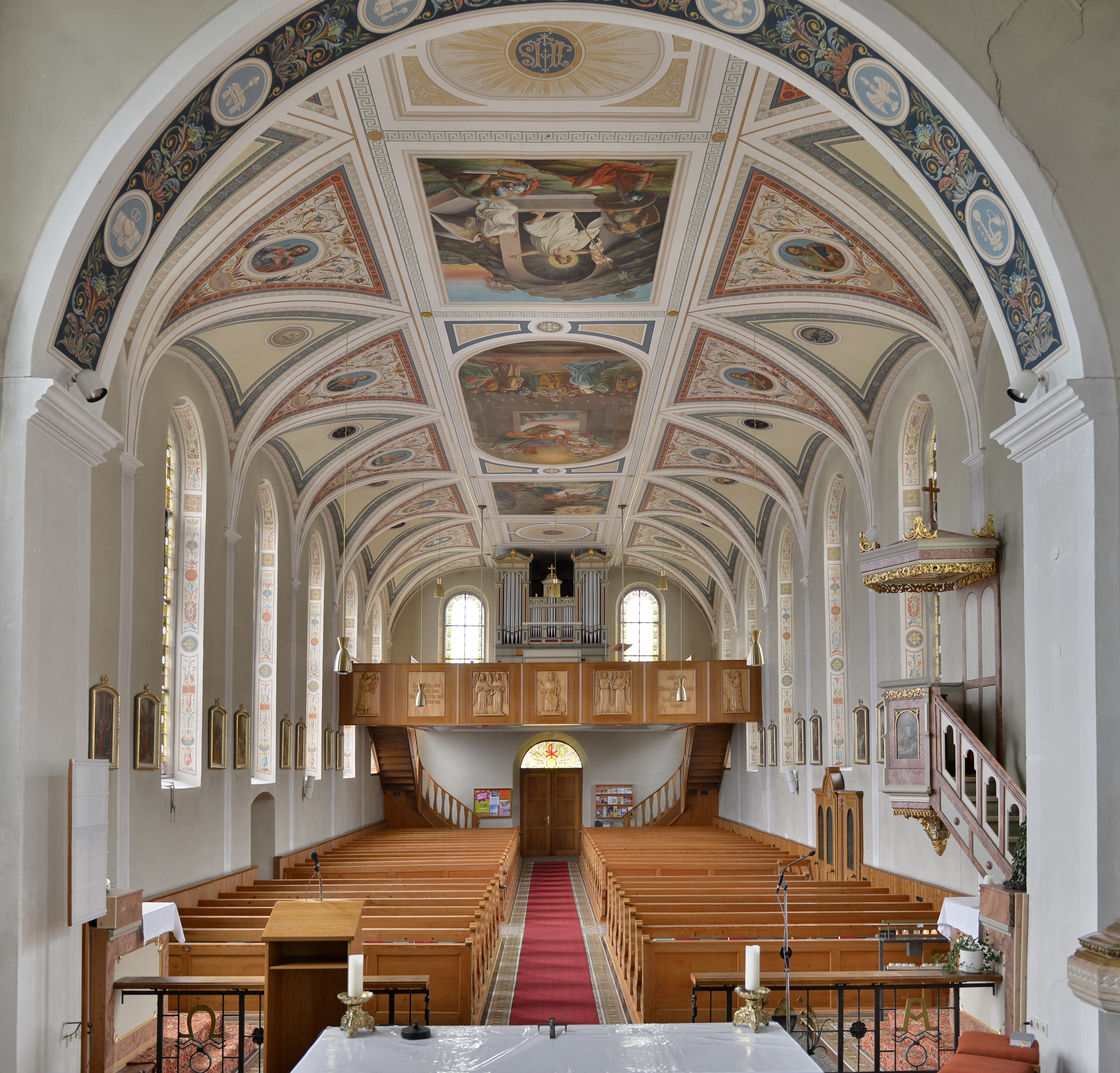 Pfarrkirche hl. Sebastian in Langen bei Bregenz in Vorarlberg.